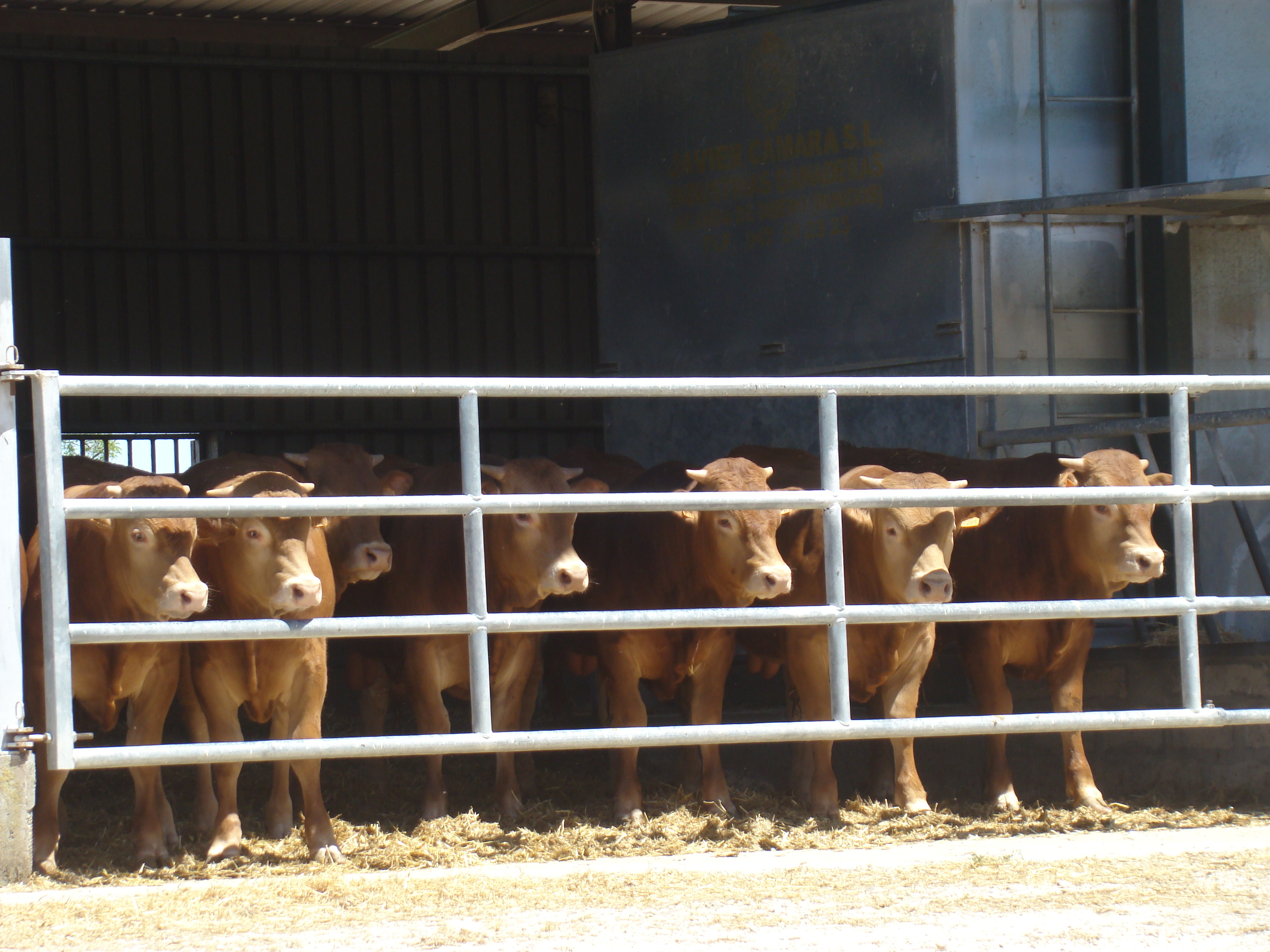 Valladolid, España. Despoblado de Fuentes de Duero. En el lugar hay una granja agropecuaria con establos para terneros.